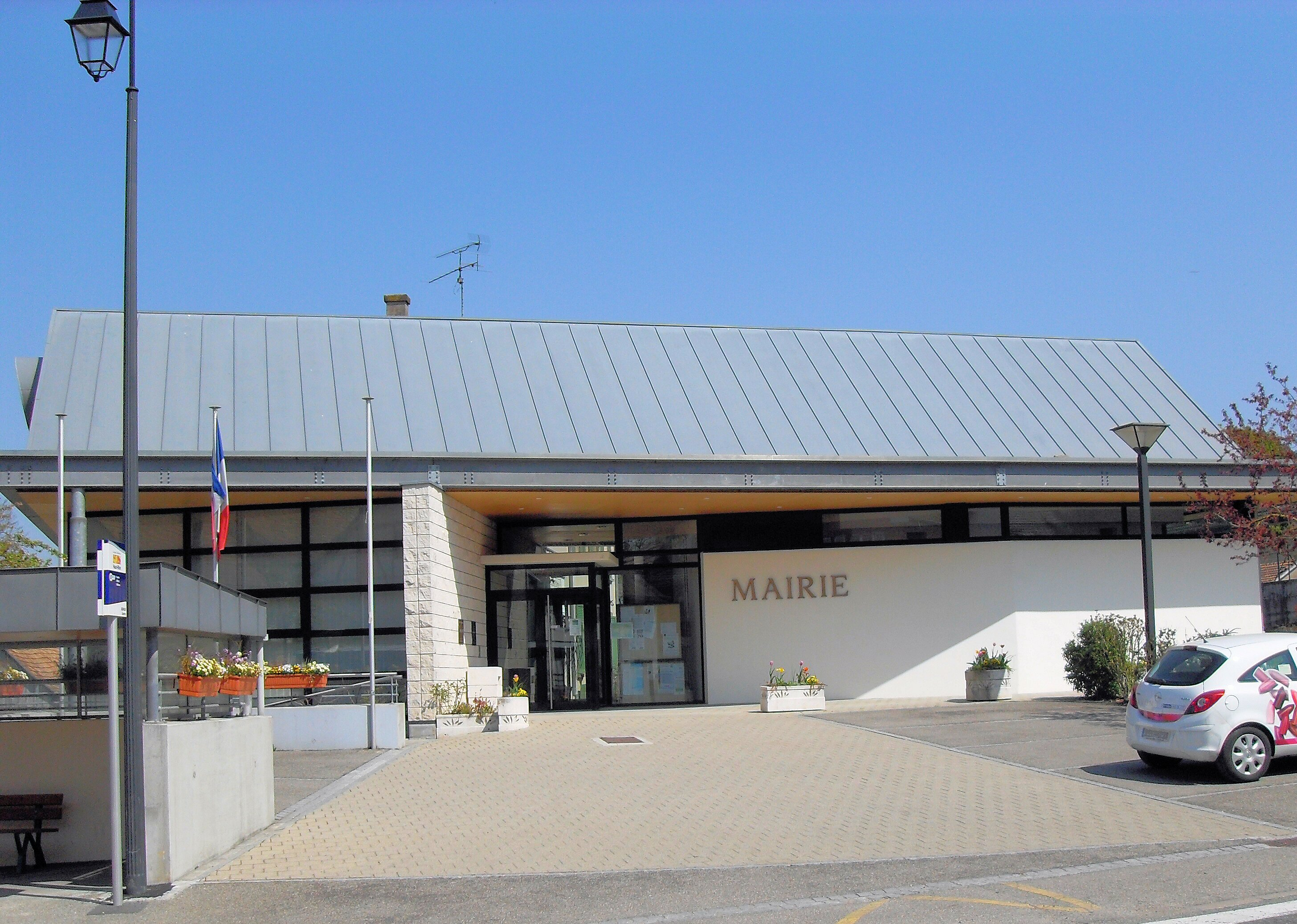 La mairie d'Aspach